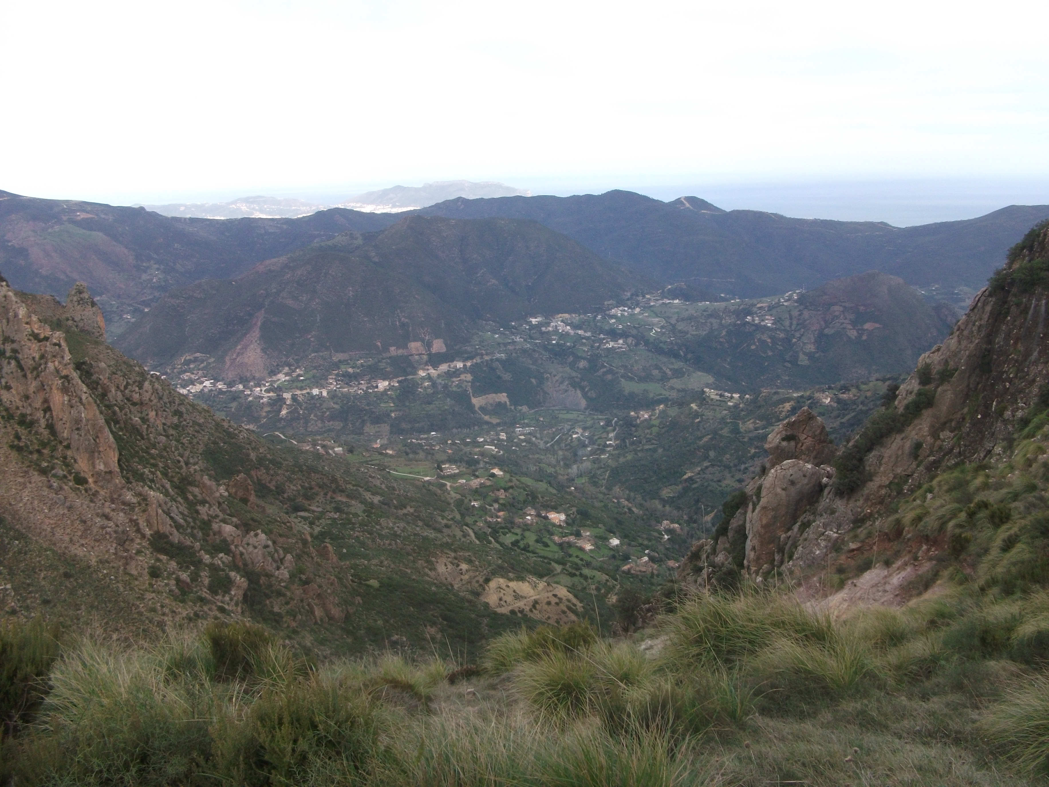 Vue générale de Boukhelifa depuis Aith Guendouz, Yemma Gouraya au fond